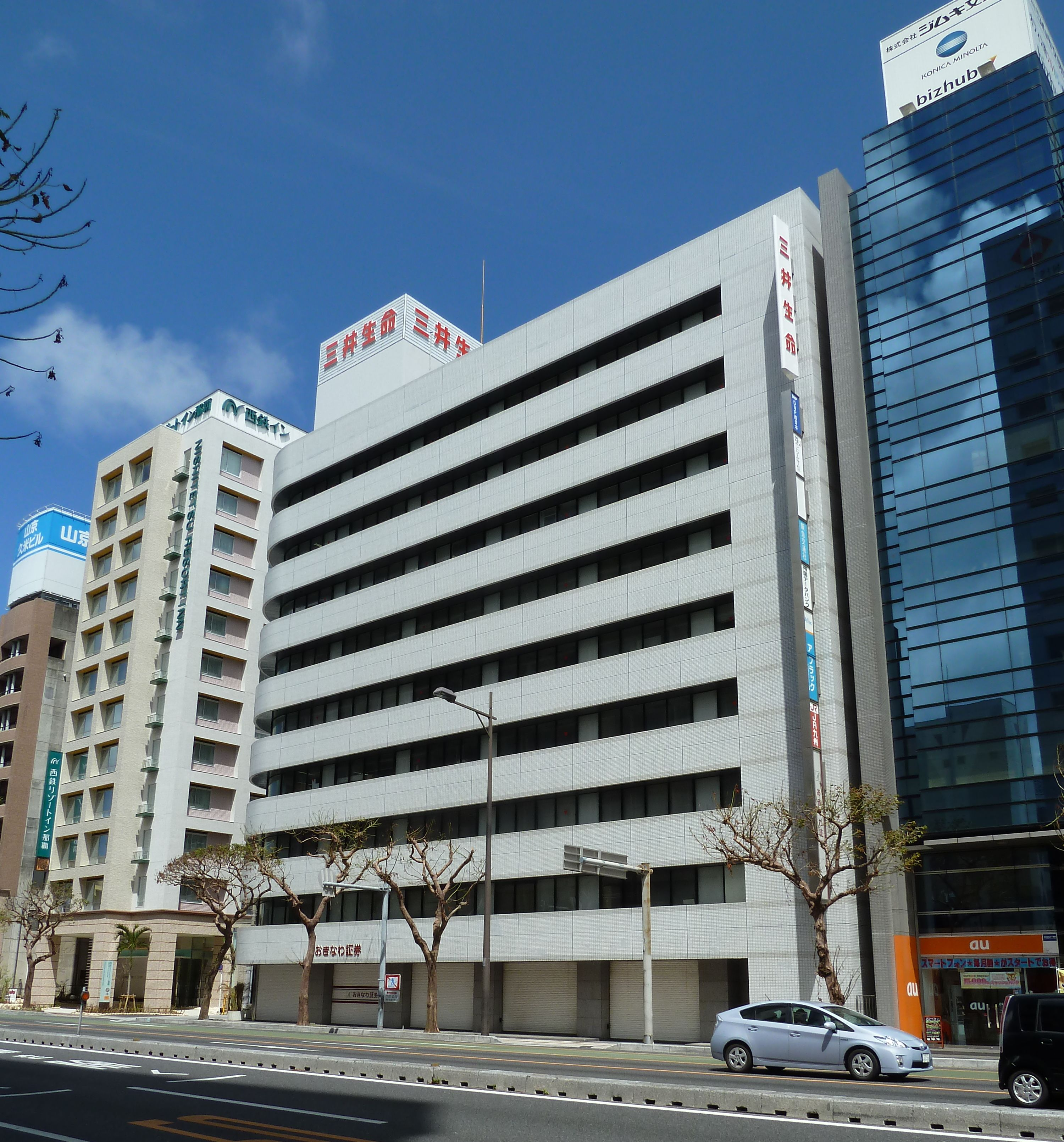 おきなわ証券